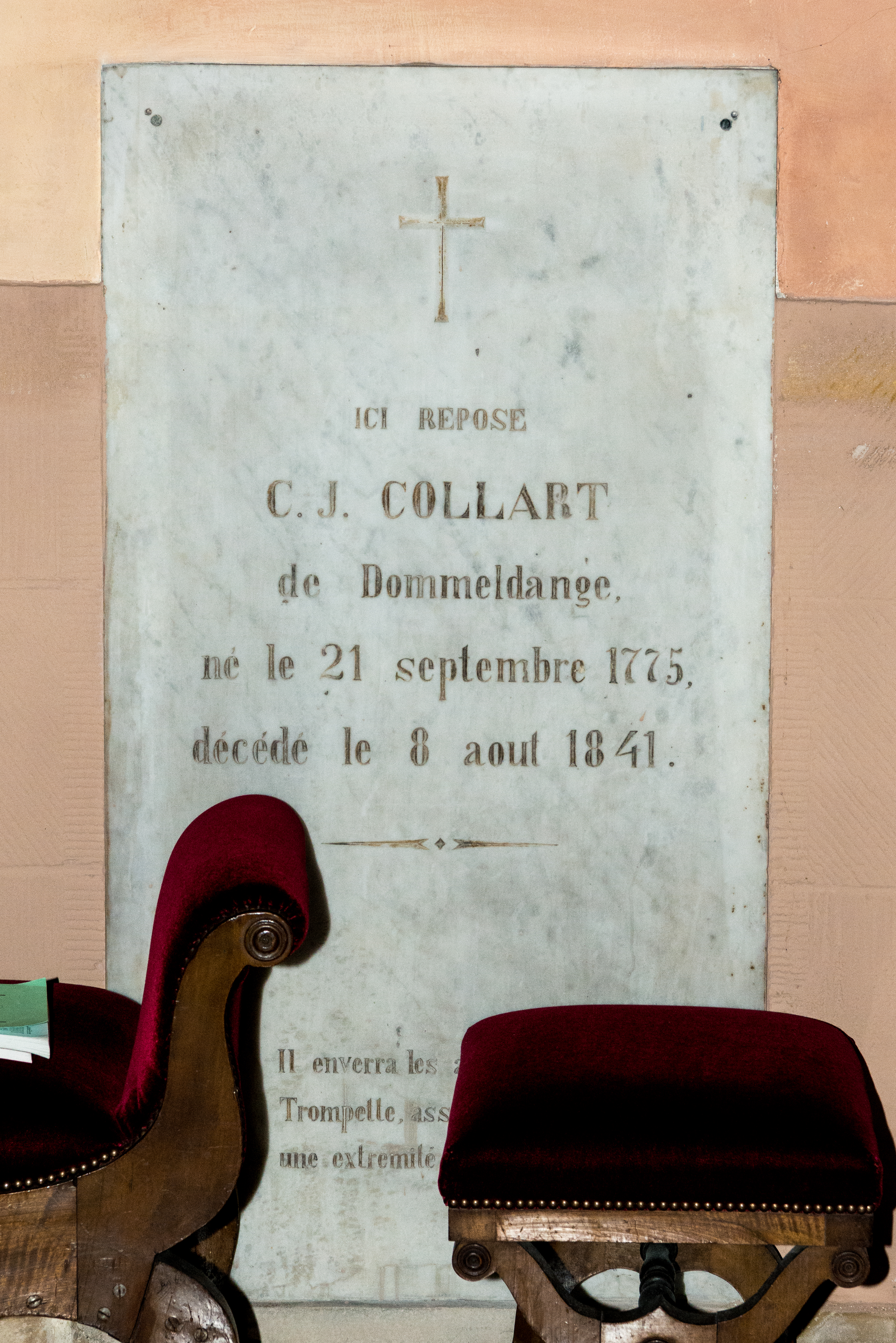 Grafplack Charles Joseph Collart an der Kierch zu Weimeschkierch.